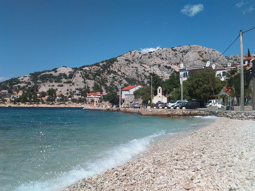 Klada